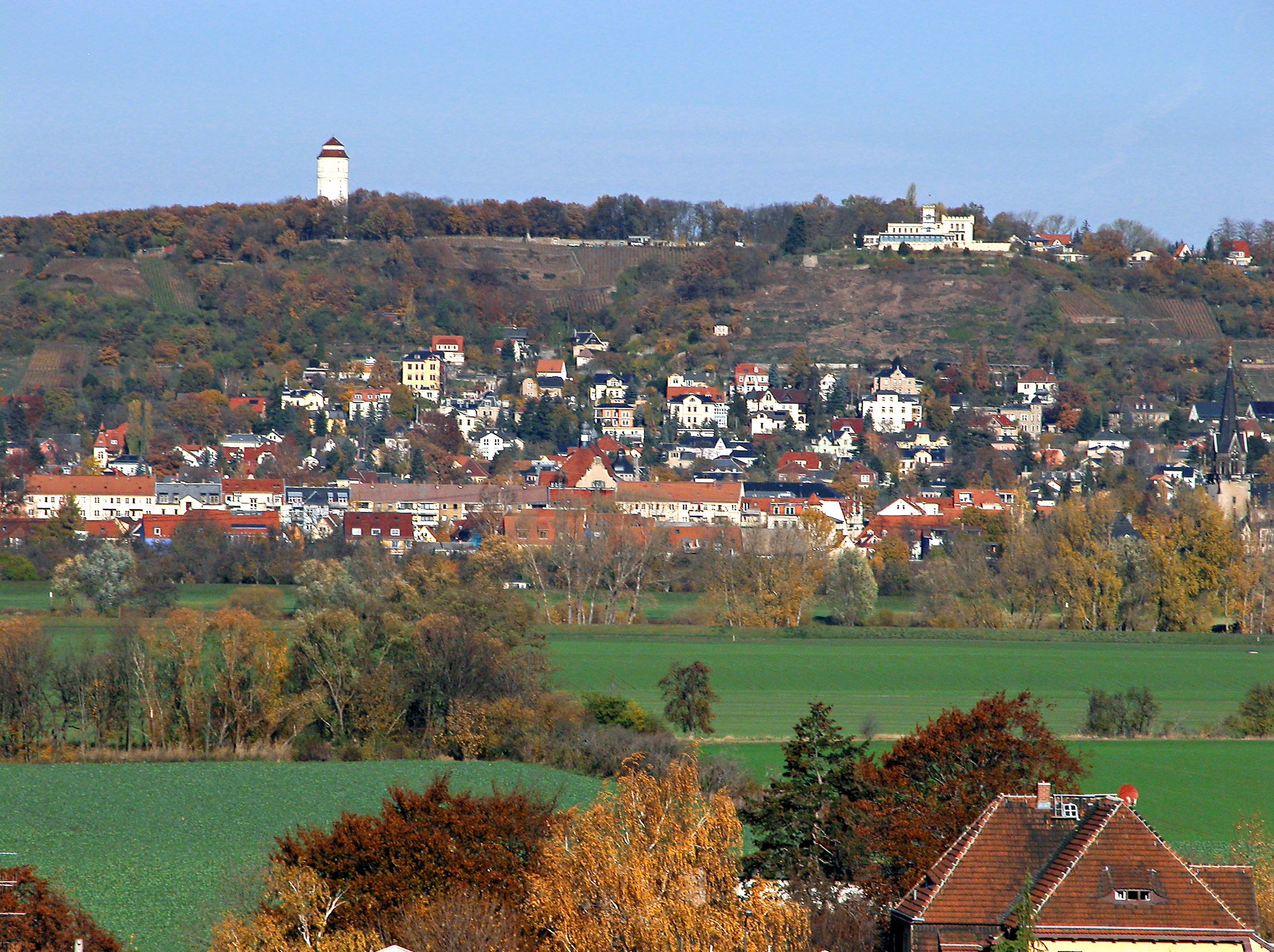 15.11.2006 01445 Radebeul: Blick von Cossebaude zu den Radebeuler Weinbergen. Links der Wasserturm, rechts die Friedensburg. [DSCN12737.TIF]20061115190DR(c)Blobelt